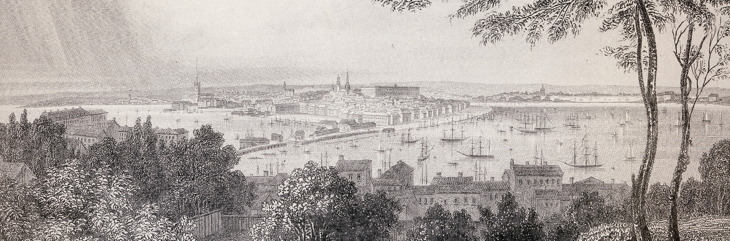 Vy från Mosebacke över Stockholm, stålstick av Johan Poppel efter en teckning av Calmeyer